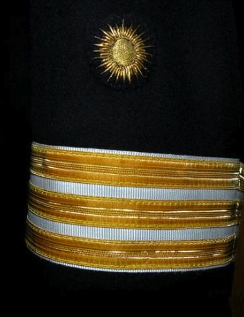 Bocamanga Teniente Coronel de Intendencia de la Armada española